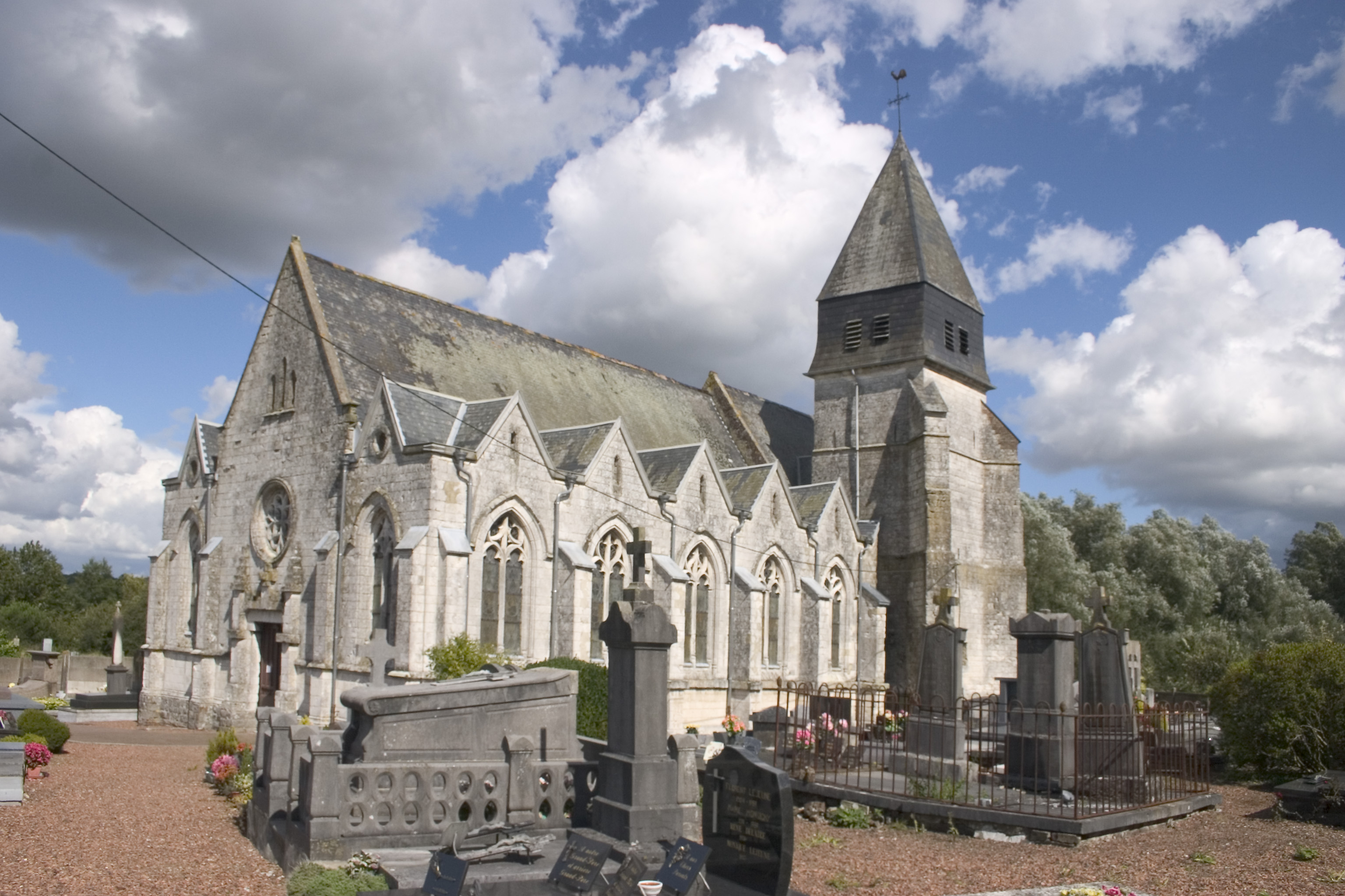 Anvin (Pas-de-Calais, Nord-Pas-de-Calais, France), église.